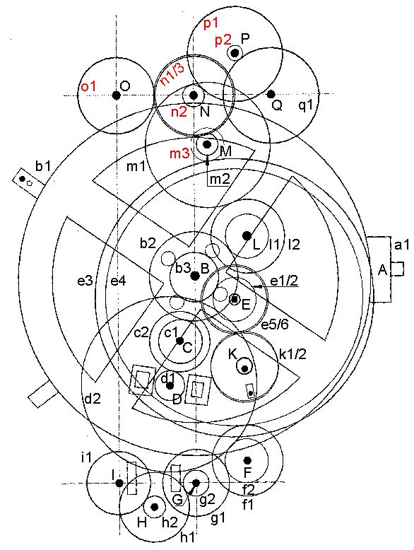 Räderschema des Mechanismus von Antikythera (hypothetische Räder sind rot markiert)